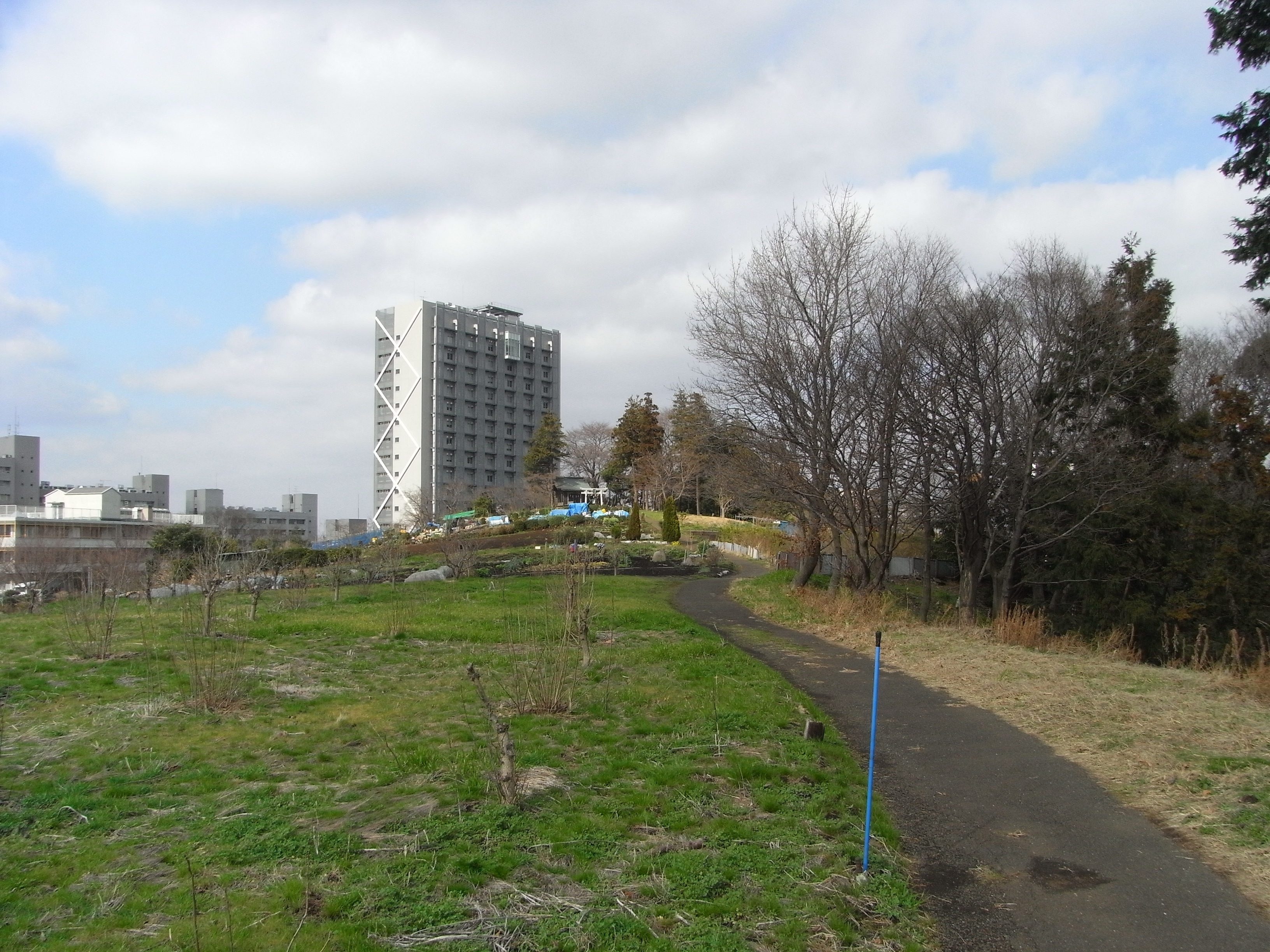 高尾山 (神奈川県)の外観